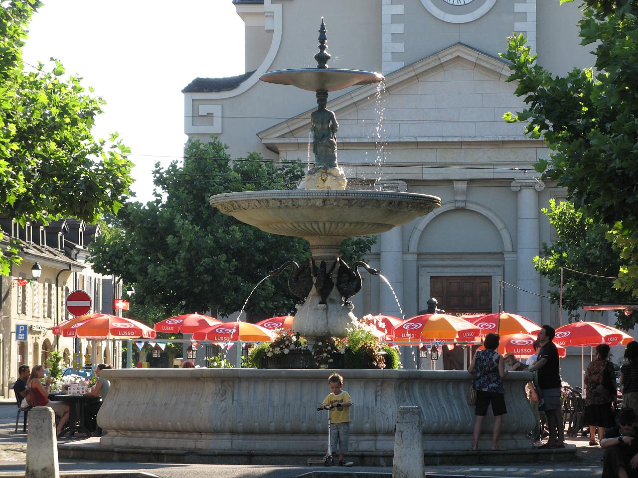 Fontaine de la place du Marché à Carouge